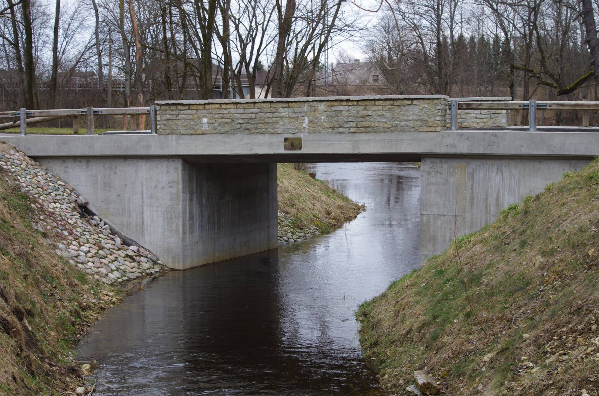 Keila jõesaare jalakäijate sild